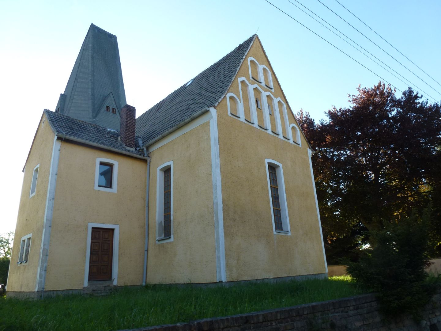 Kirche in Trautzschen